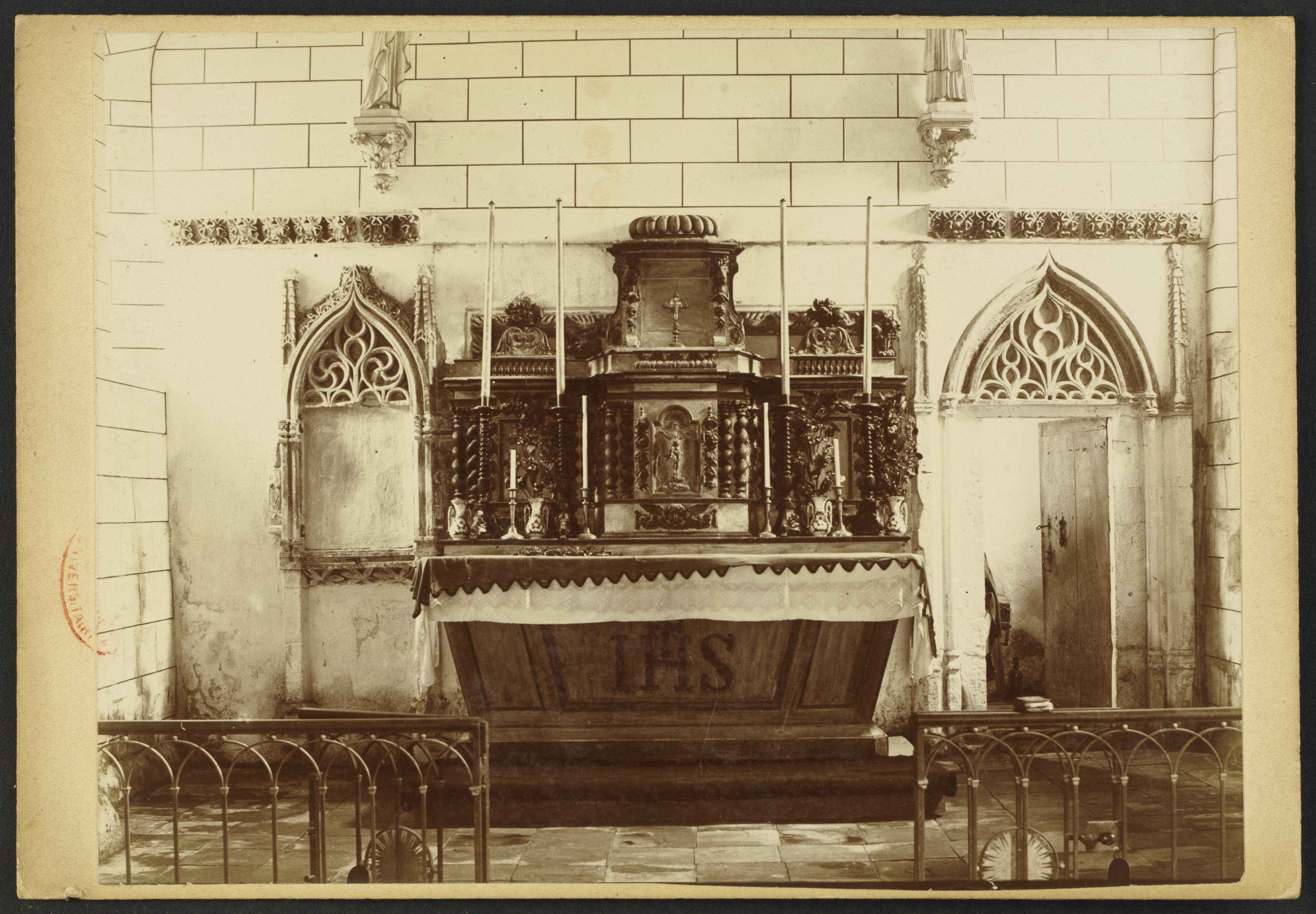 Église Saint-Laurent de Bossugan; retable du maître-autel.